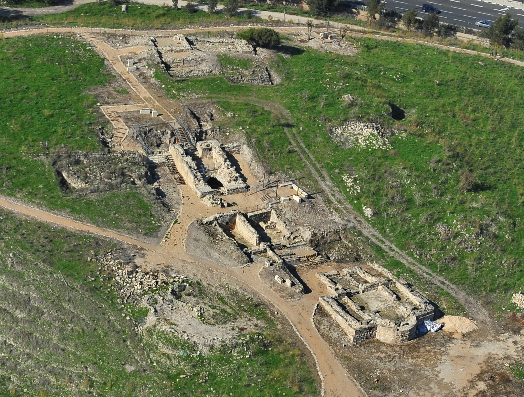 תֵּל יָקְנְעָם הוא תל גדול הנמצא בסמוך ליקנעם של ימינו, על גבול עמק יזרעאל ורכס הכרמל. תל יקנעם ממוקם בסמוך לאחת מהדרכים החשובות ביותר בעת העתיקה אשר עברה בואדי מילק וקישרה בין דרך הים (ויאה מריס) והדרך המובילה צפונה לעיר צור. נקודה זאת הקנתה ליקנעם העתיקה ערך אסטרטגי וכלכלי רב. התל ממוקם בגובה 70 מטר מעל פני הואדי.